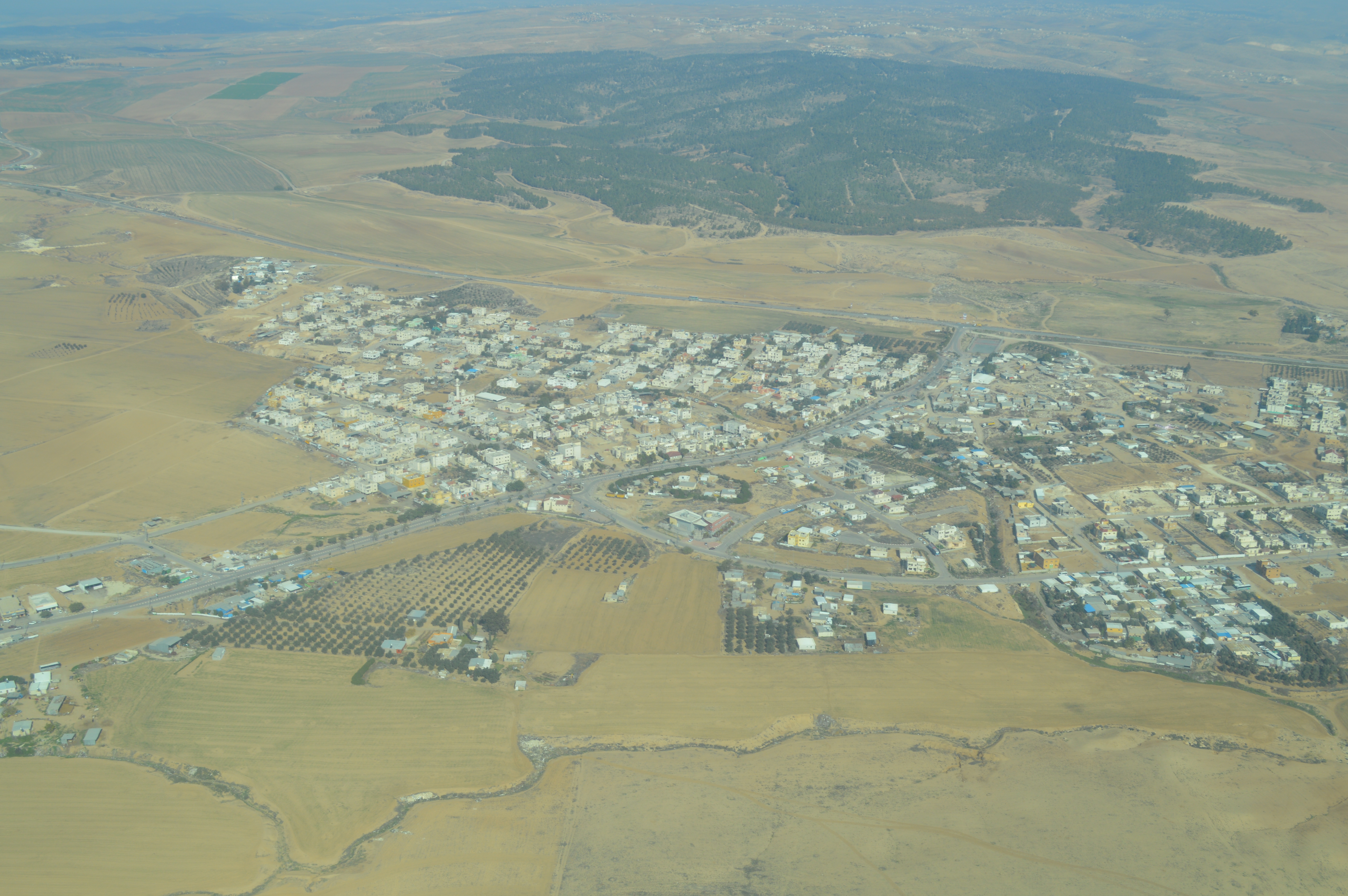 צילום אוויר - אבו עבדון (לקיה)